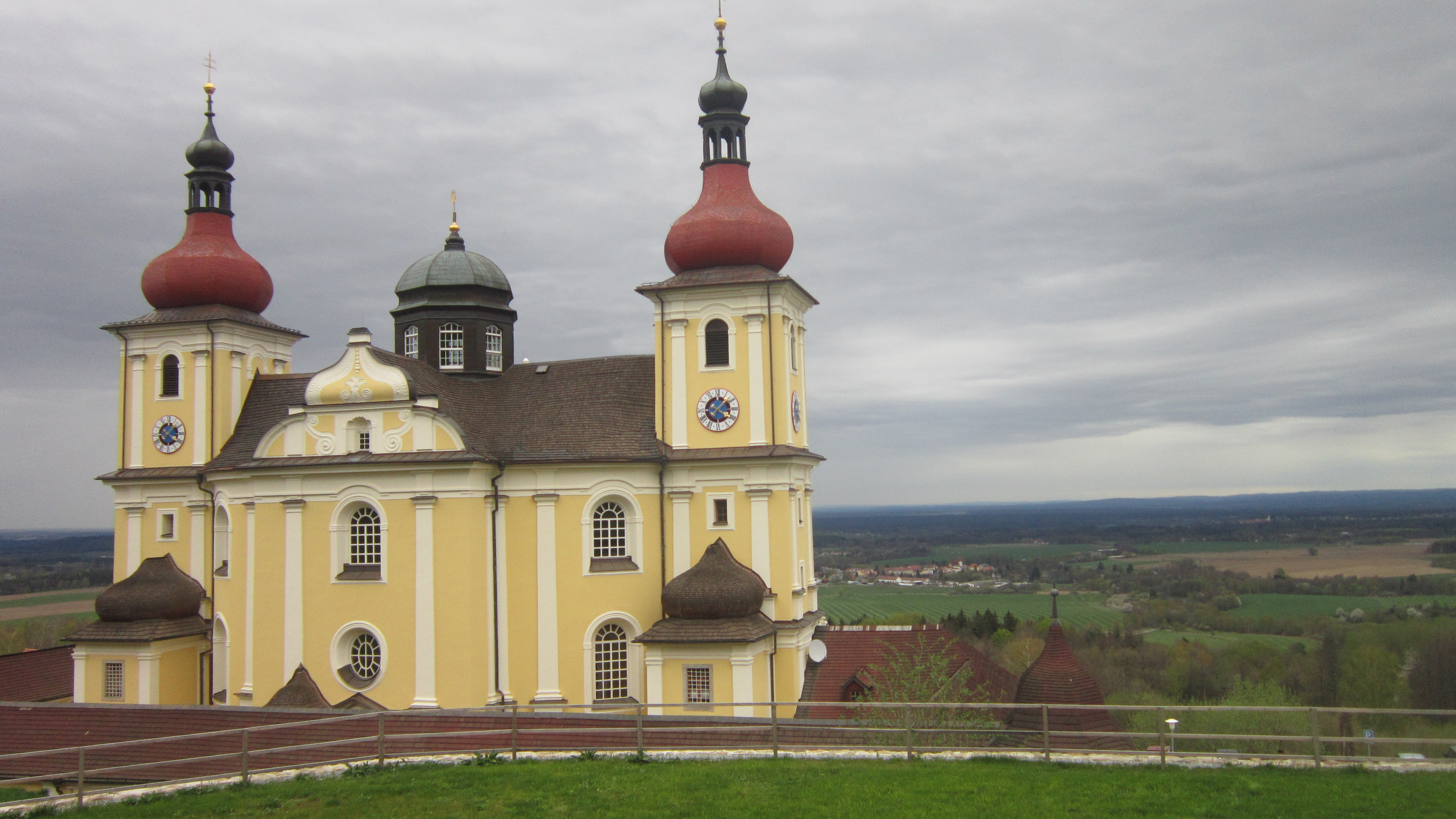 Kostel Dobrá Voda, pohled na Novohradsko.